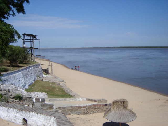 Balneario de la ciudad de La Paz, Entre Ríos, Argentina.